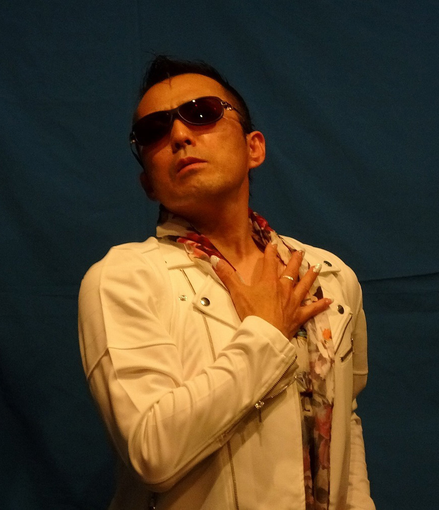 魚住 弘樹